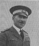 Aviatore italiano